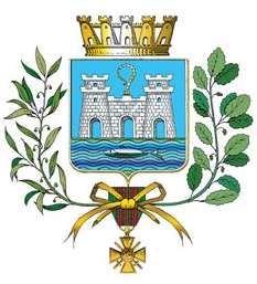 Blason de la ville de La Ciotat